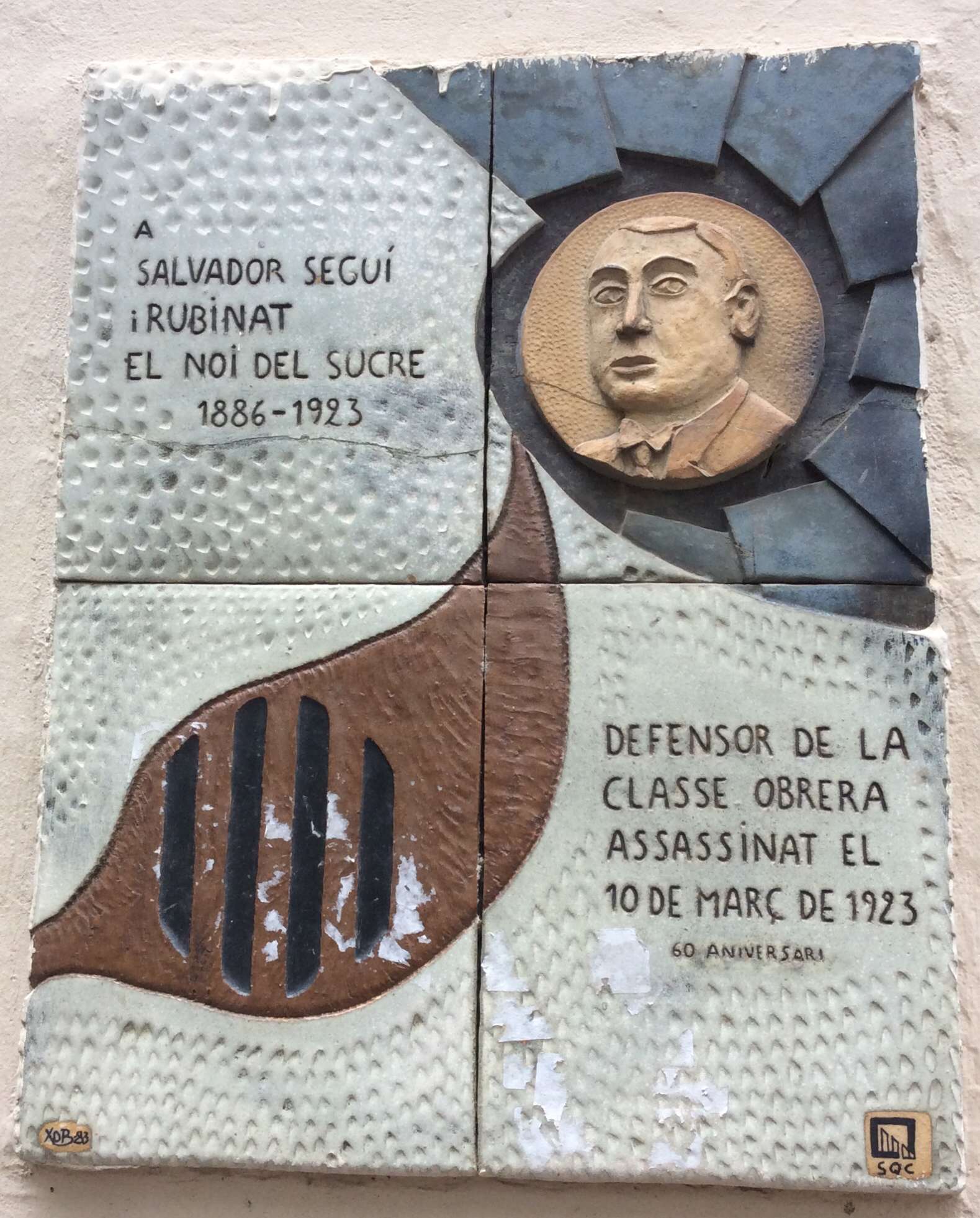 Plaque to the anarchist Salvador Seguí, Carrer de Sant Rafael, Barcelona.